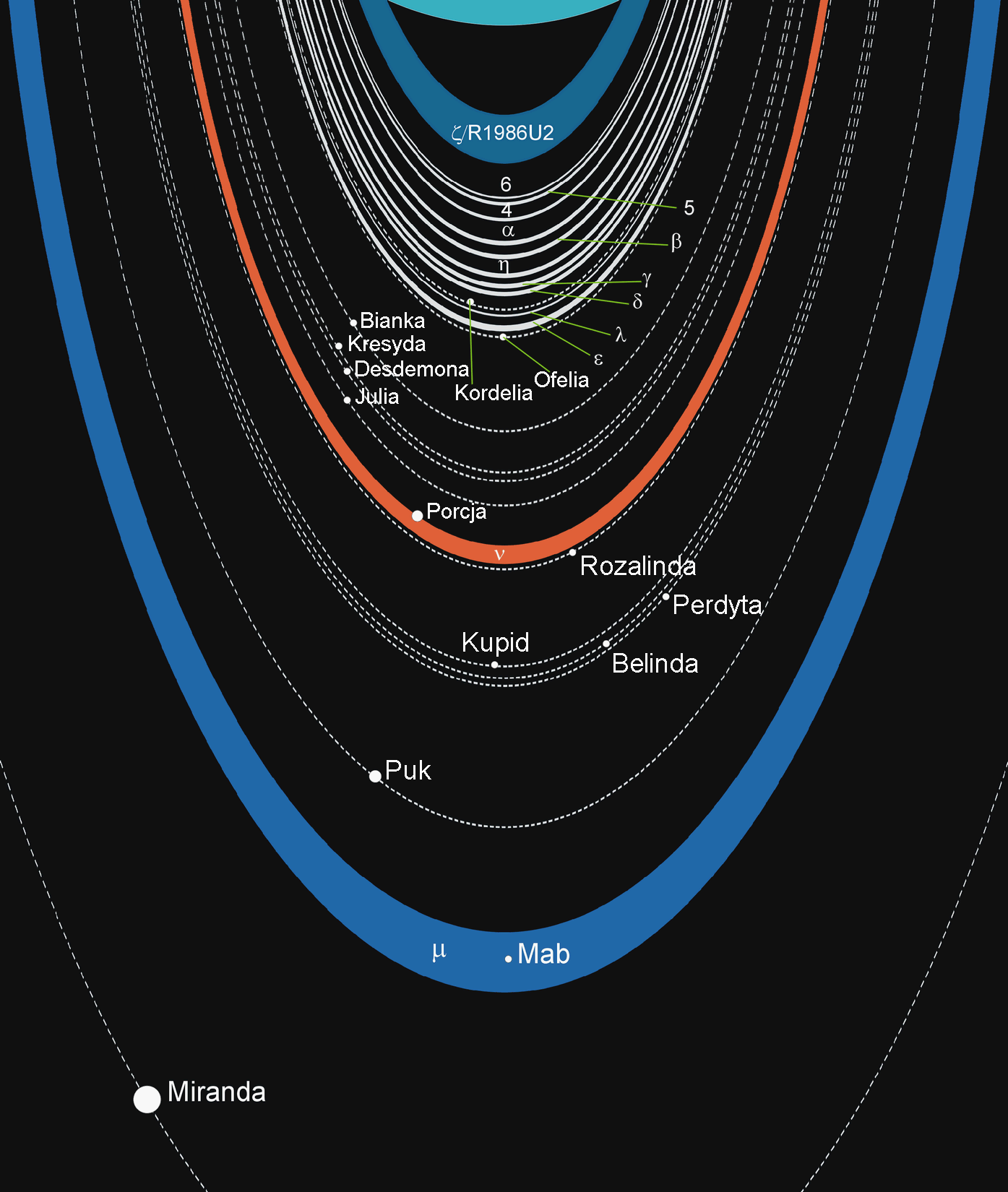 Schemat pierścieni Urana i wewnętrznej części układu satelitów. Orbity i odcinek tarczy planety są w skali.